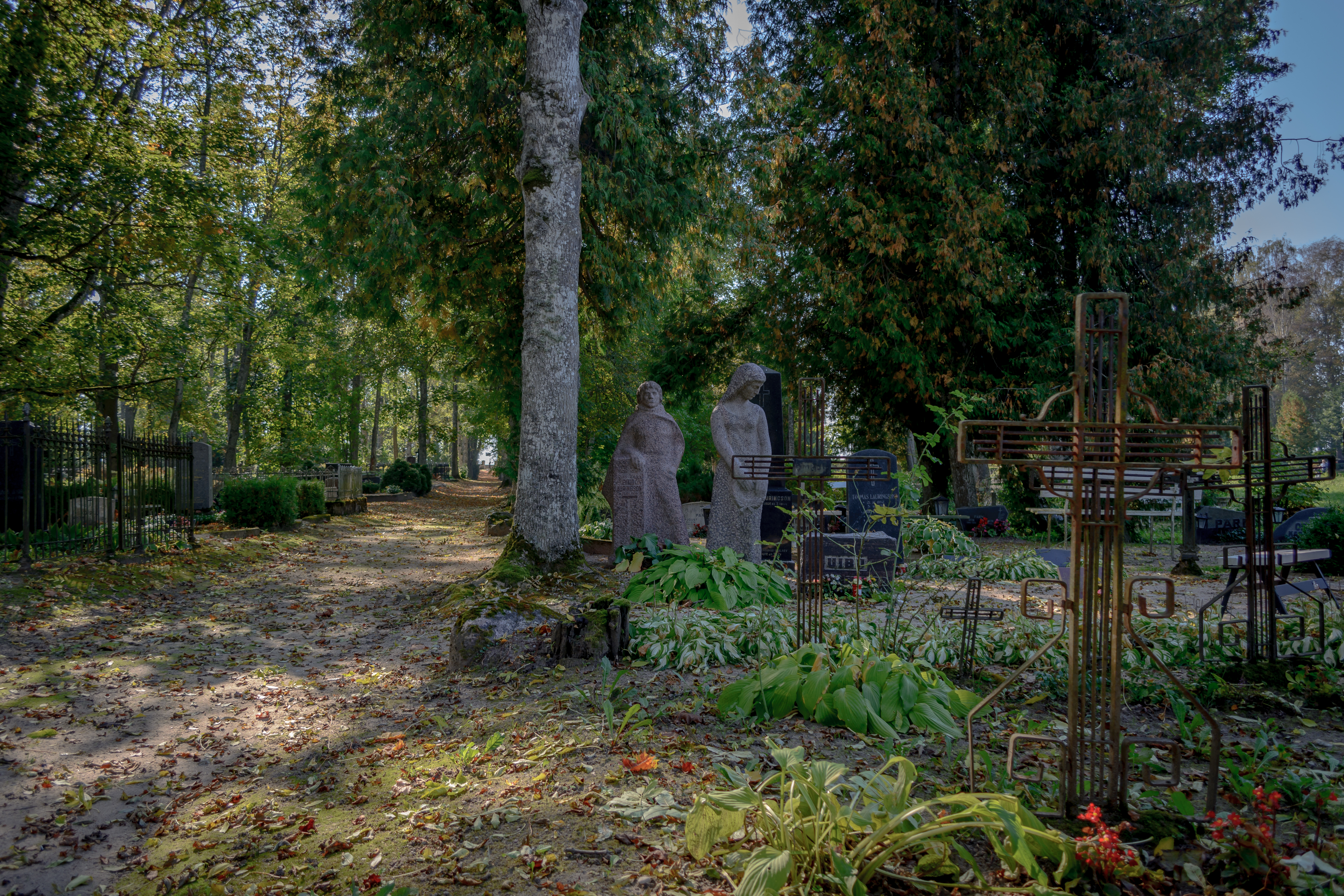 Torma kalmistu